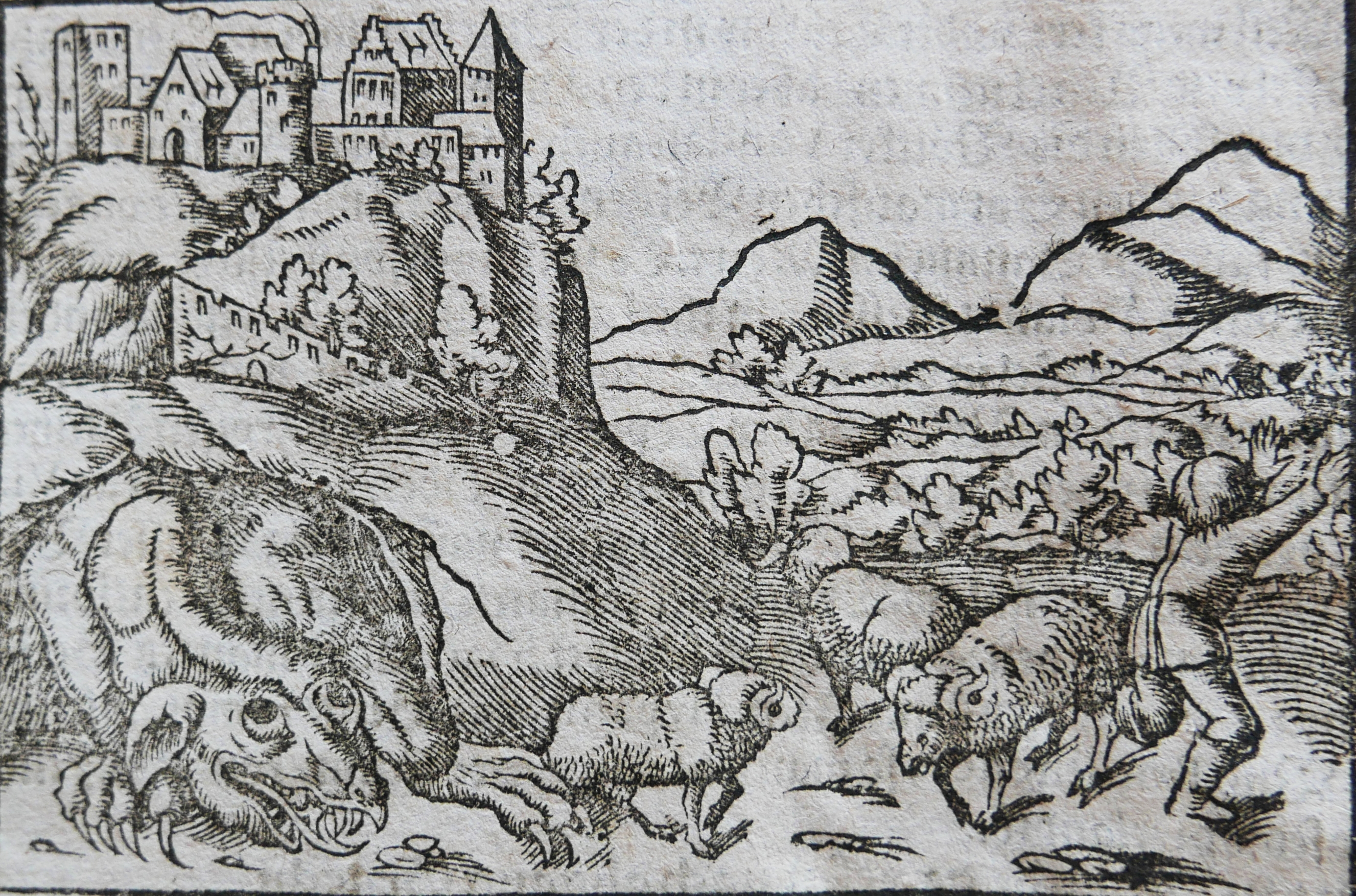 Smok Wawelski, dragon of Kraków